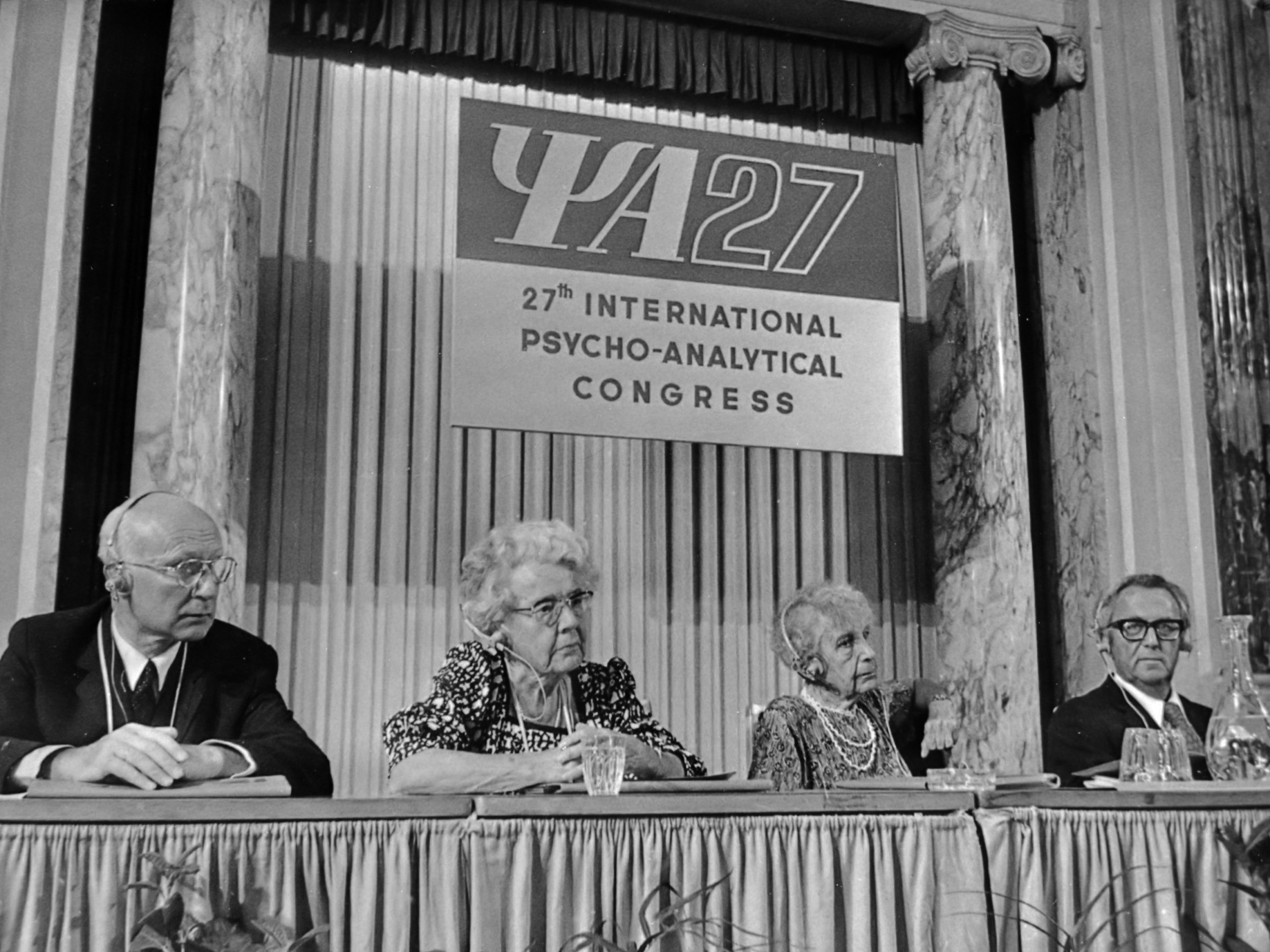 27e internationaal psycho-analytisch congres te Wenen, v.l.n.r. Van de Leeuw, dr. Jeanne Lampl-de Groot, dr. Anna Freud en dr. Leo Rangell (VS) 28 juli 1971